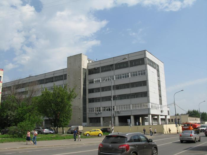 НПП «Салют». Перово. Москва.